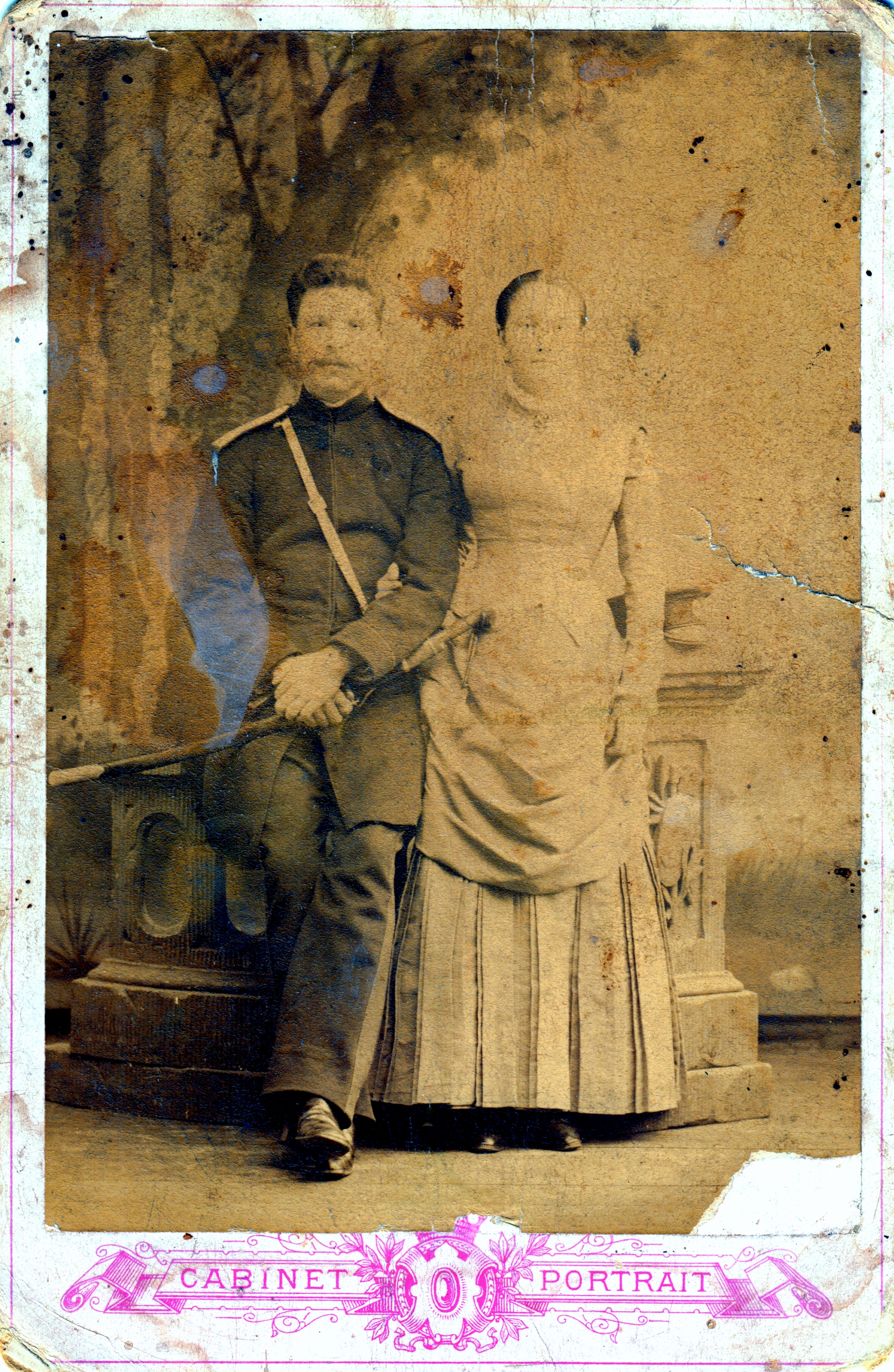 Иван Бабкин с супругой во время службы в Вильно, 1880-е года. Иван Николаевич (Войсковой Старшина), Пелагея Петровна, донская казачка стан. Мигуленской.